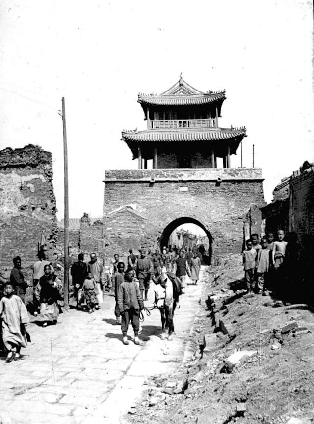 1900年前后的天津